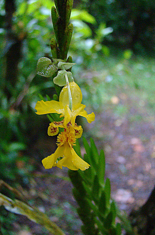 A mesoamerican species. Dr. Stephan Kirby Orchid Garden, Bosque de Paz, Costa Rica. In context at